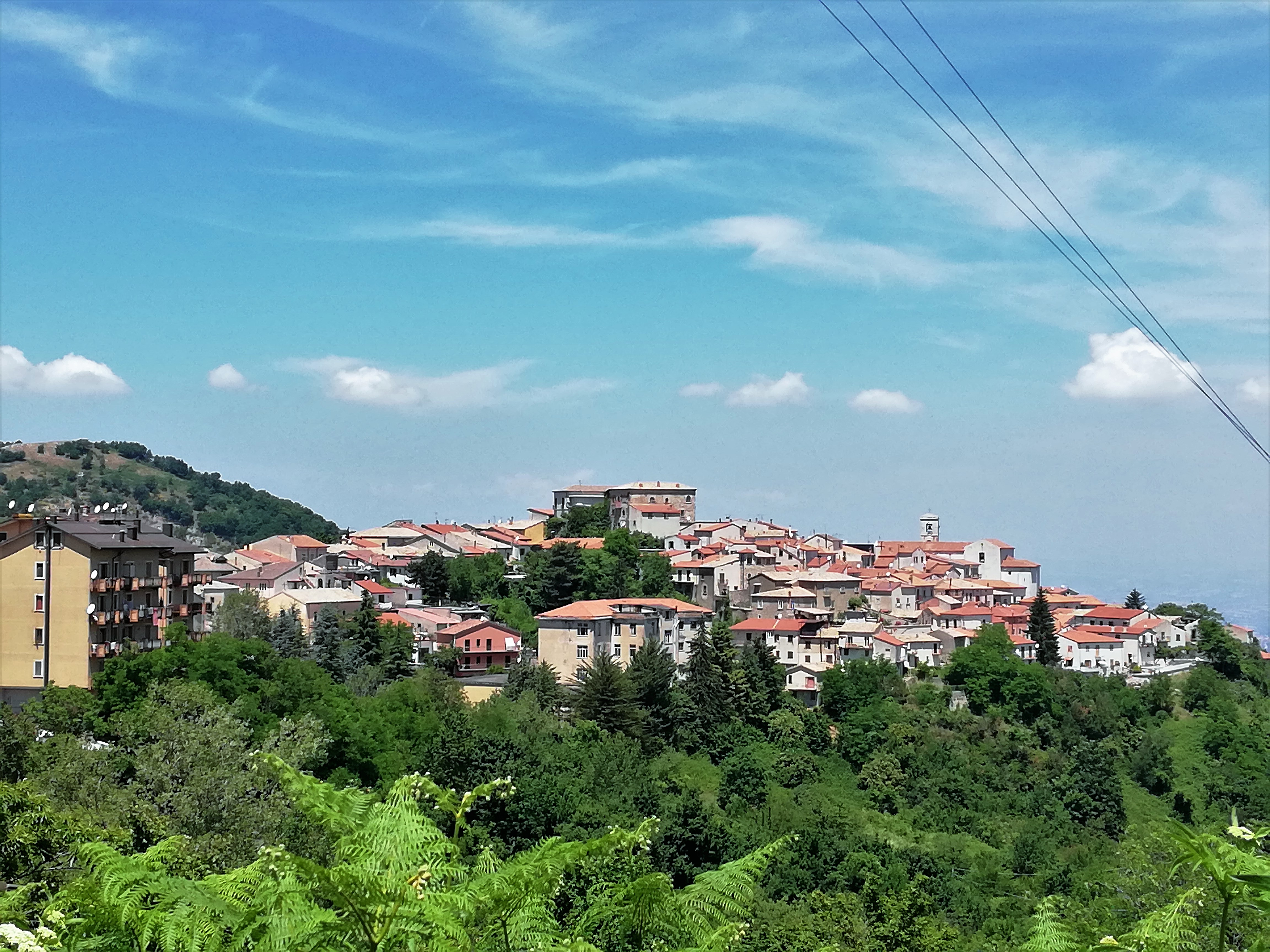 Veduta panoramica.